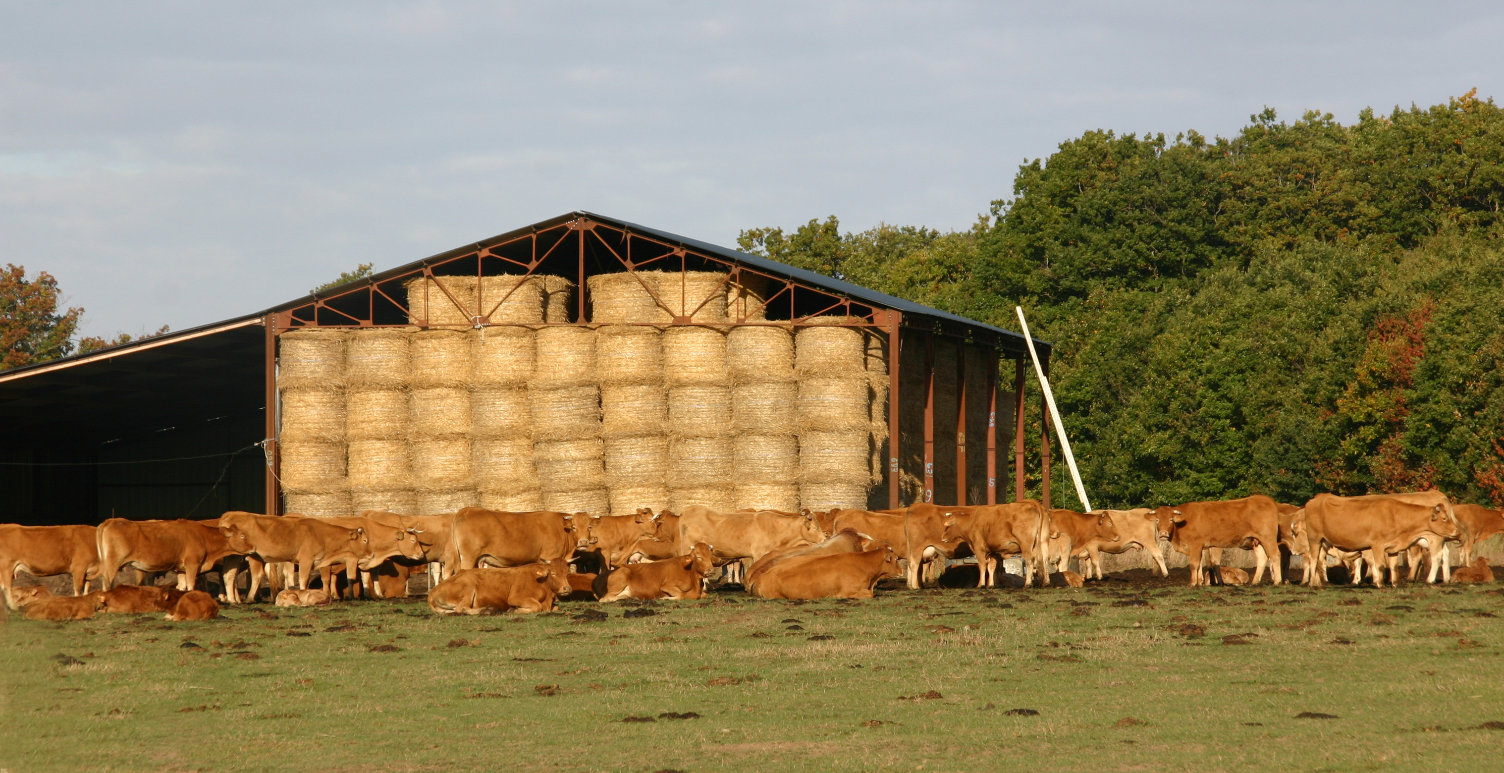 Saint-Martin-des-Bois